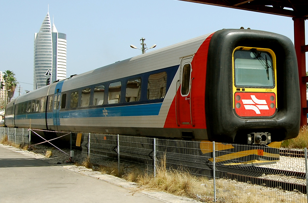 קרונוע מדגם IC3 מספר 39 של רכבת ישראל בתחנת רכבת חיפה מזרח